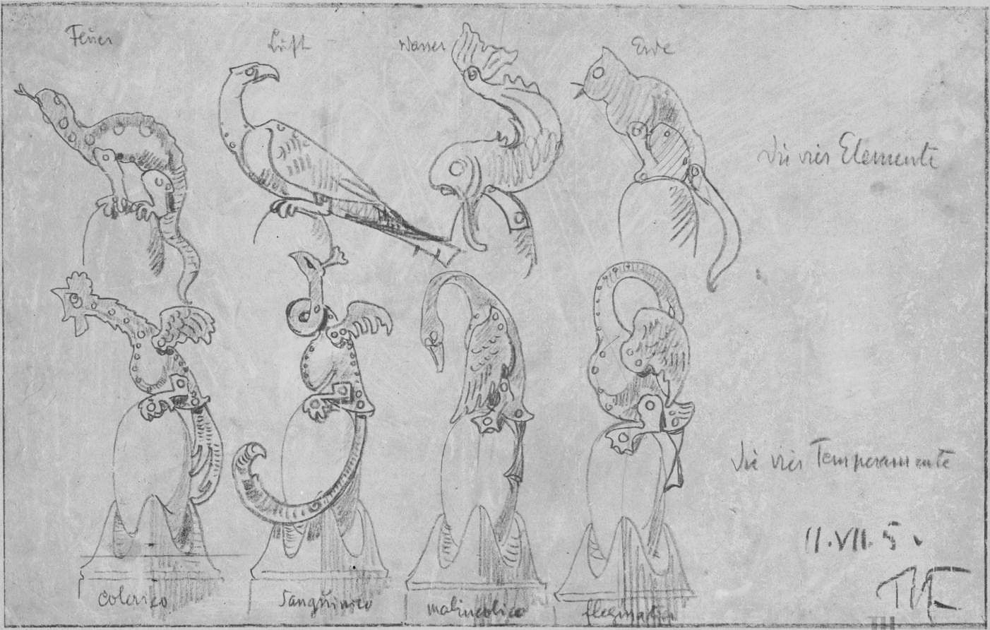 Dachfiguren der Heusteigschule in Stuttgart, Entwurf von Theodor Fischer, 1905.